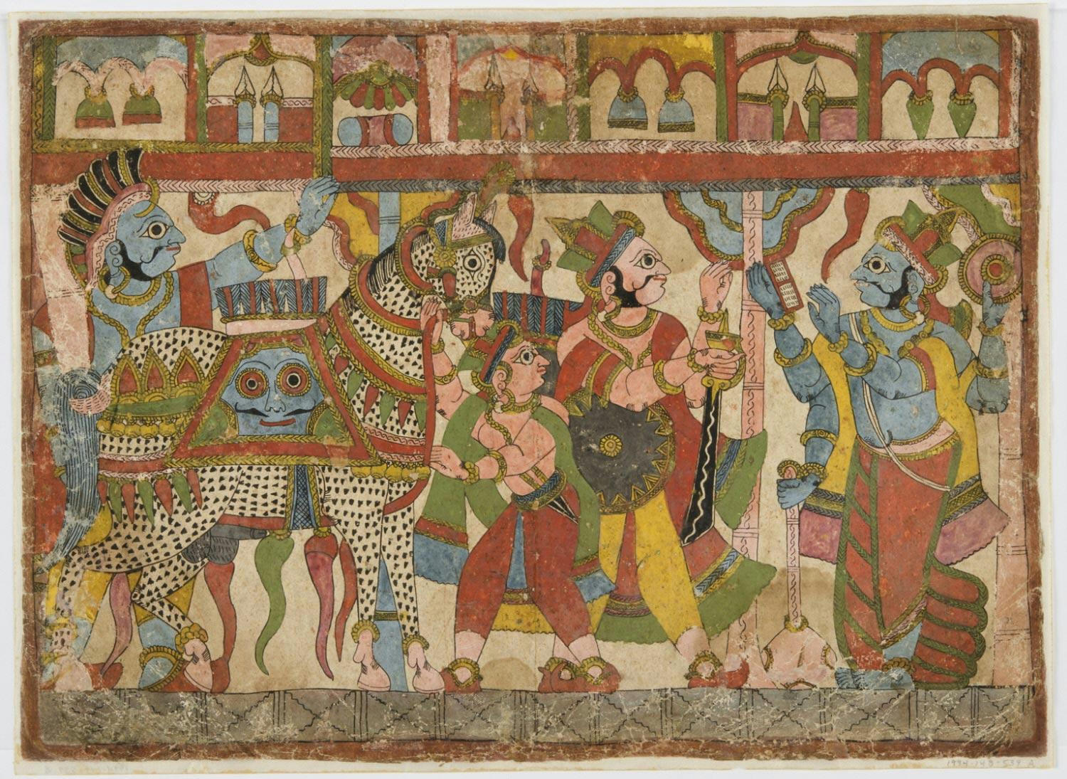 6 Krishna Advising on the Horse Sacrifice (front); Preparing the Army to Follow the Sacrificial Horse (back) Probably from a picture-story series of the Shri Jaimini Ashvamedha episode of the Mahabharata Made in Deccan region, Maharashtra or Karnataka, India Paithan type, 19th century Artist/maker unknown, India, Deccan region, Maharashtra or Karnataka Opaque watercolor on paper 12 1/2 x 17 inches (31.8 x 43.2 cm) Currently not on view 1994-148-539a,b Stella Kramrisch Collection, 1994 Label Many of the narratives illustrated in picture-story paintings were local versions adapted from classical Hindu sources. This double-sided page shows scenes from a popular story based on an episode in the Hindu epic Mahabharata. Yudhishthira, the eldest of the Pandava brothers, wanted to perform the Ashvamedha (horse-sacrifice), in which a special horse would be allowed to wander freely for a year. Anyone who challenged the horse's freedom would face the accompanying Pandava army, led by the youngest Pandava brother, Prince Arjuna. These paintings show preparations for the sacrifice. On the front, three heroes present an elaborately ornamented horse to the Pandavas' court, where they seek advice from the four-armed deity Krishna. On the back, the cavalry prepares to follow the sacrificial horse in its wanderings.